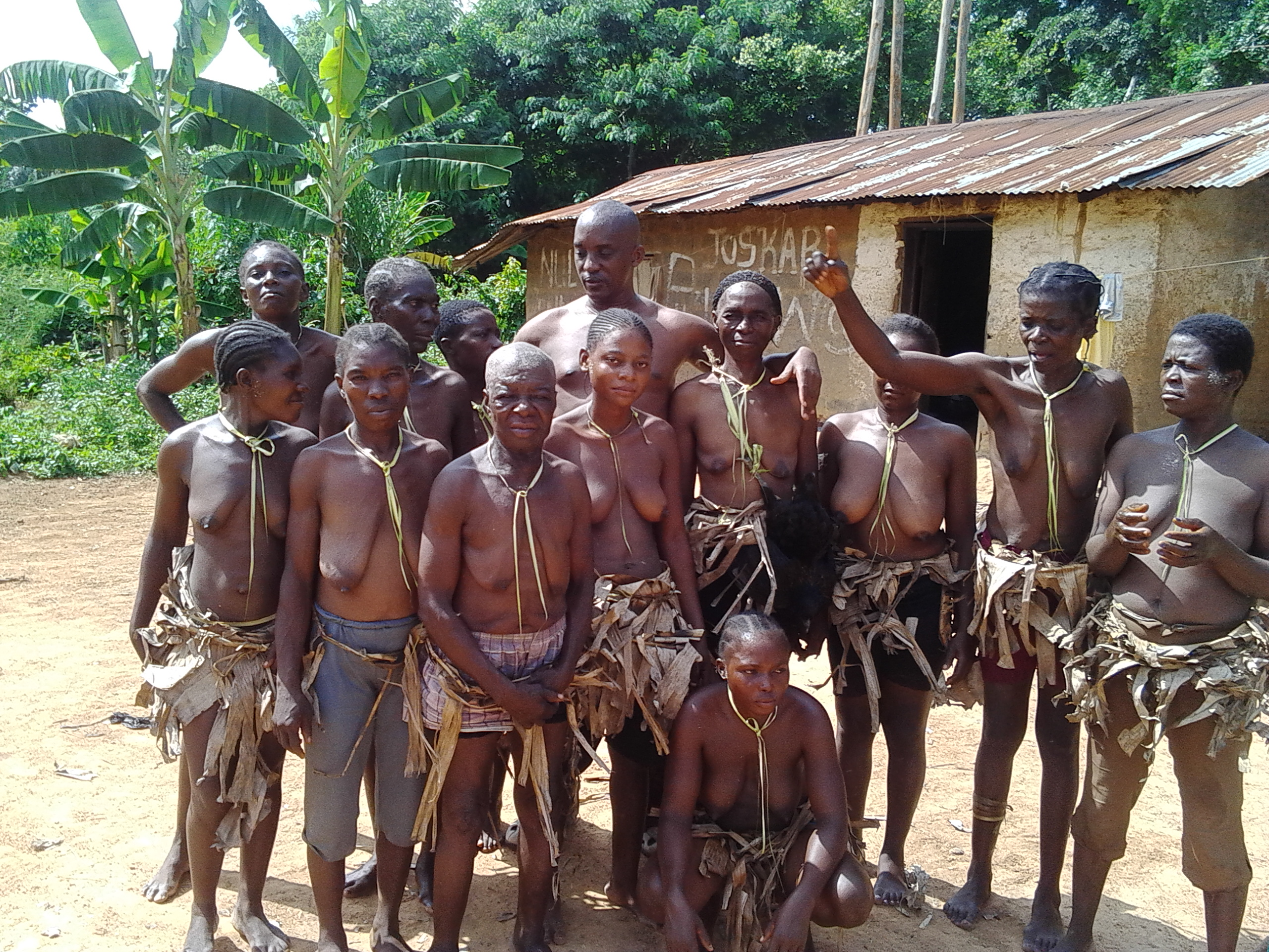 Tenue arborée lors d'une cérémonie de Mbaka. Mbaka est un rituel exécuté chez le peuple Ukî pour conjurer le mauvais sort, à la suite d'une mort violente ou accidentelle.